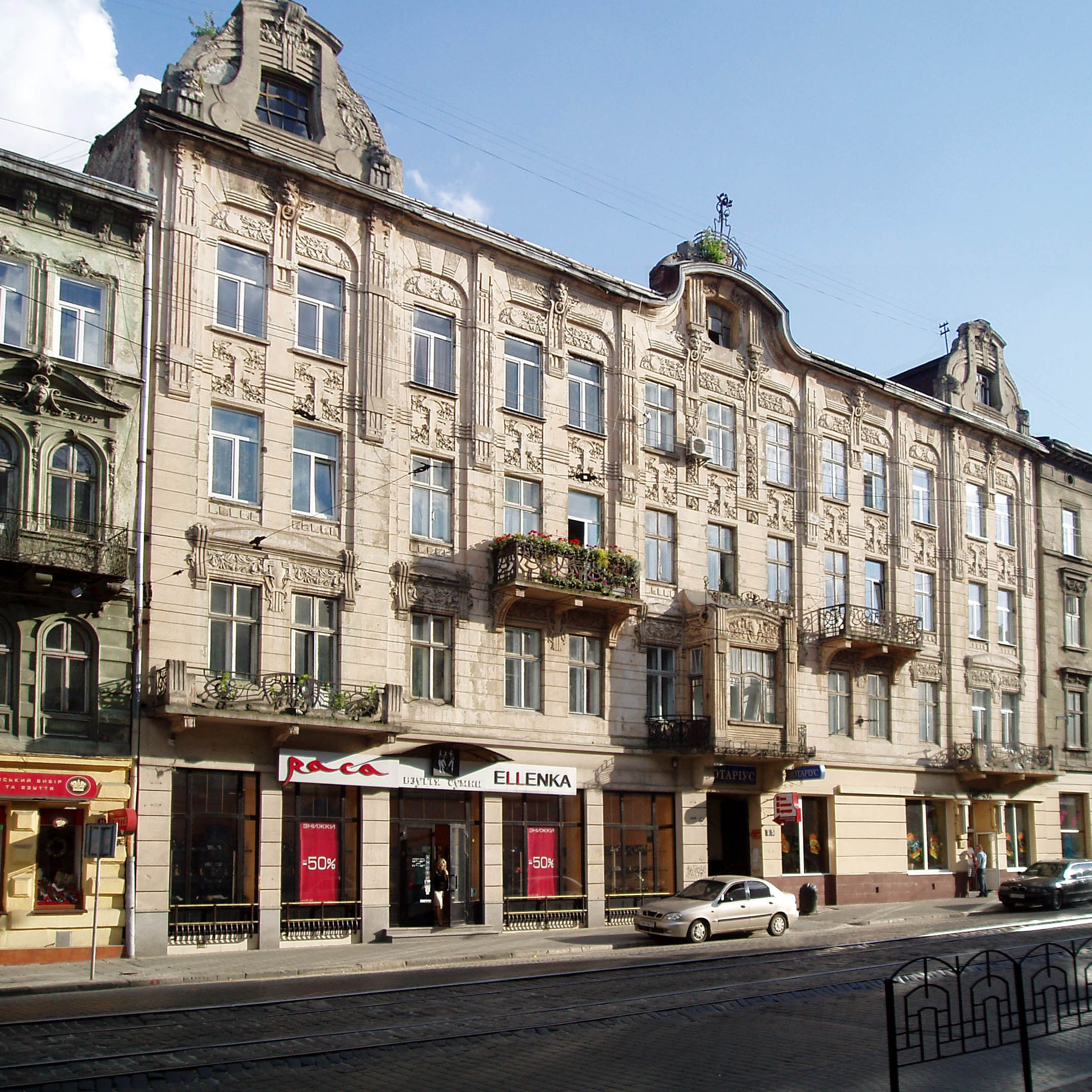 Дім № 45 на вулиці Городоцькій у Львові